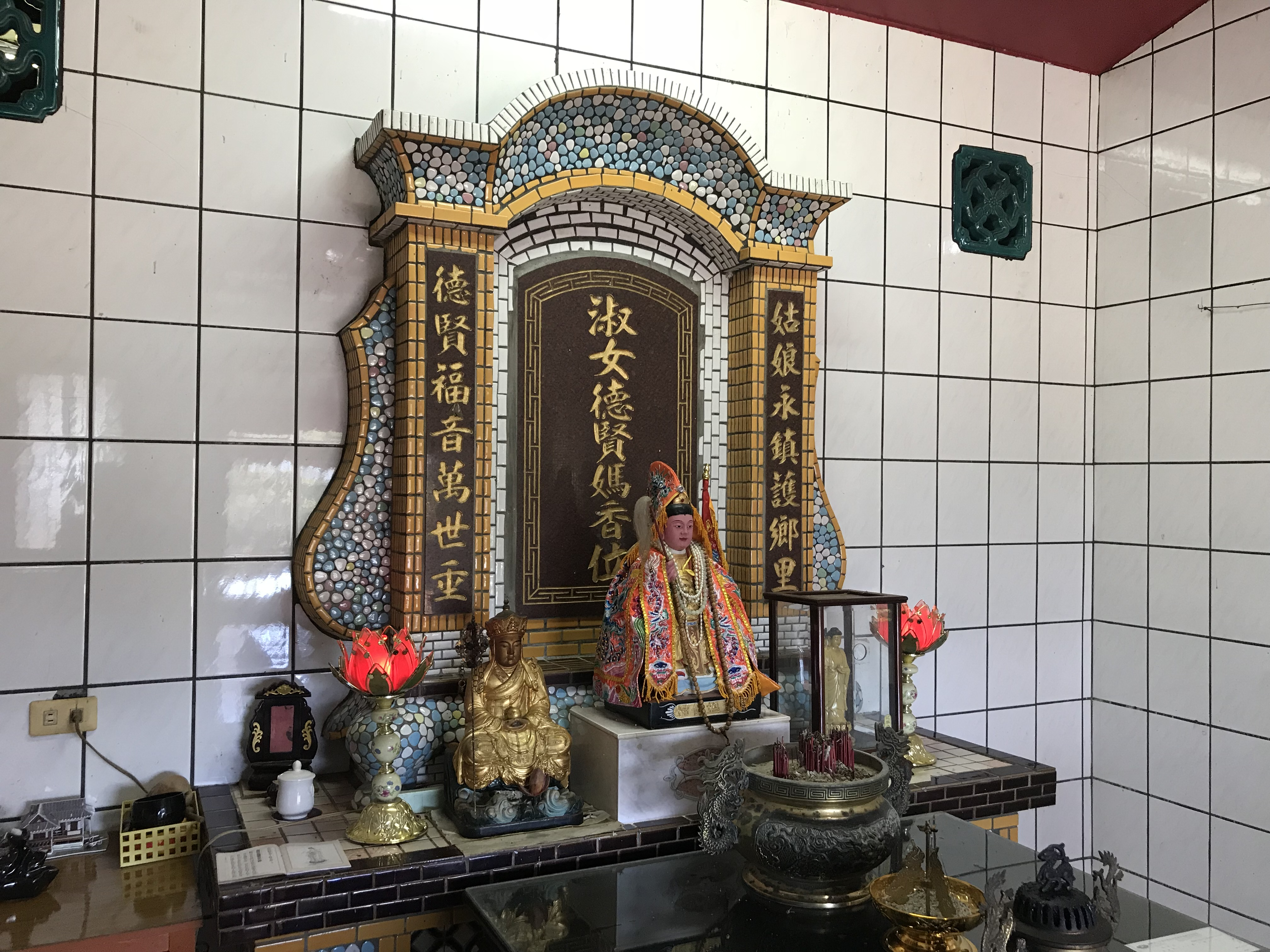 中文（台灣）: 德賢祠德賢媽等神像